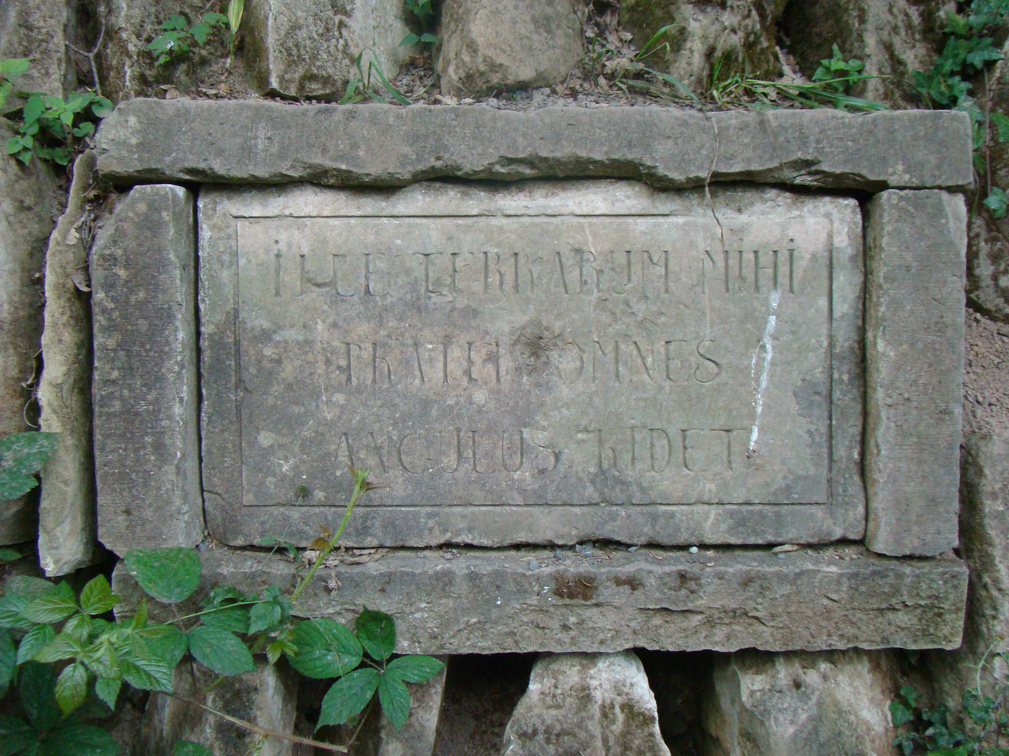 Köpferbrunnenanlage in Heilbronn: Ille terrarum mihi praeter omnes angulus ridet ("Dieser Erdenwinkel lacht mir vor allen", Horaz)